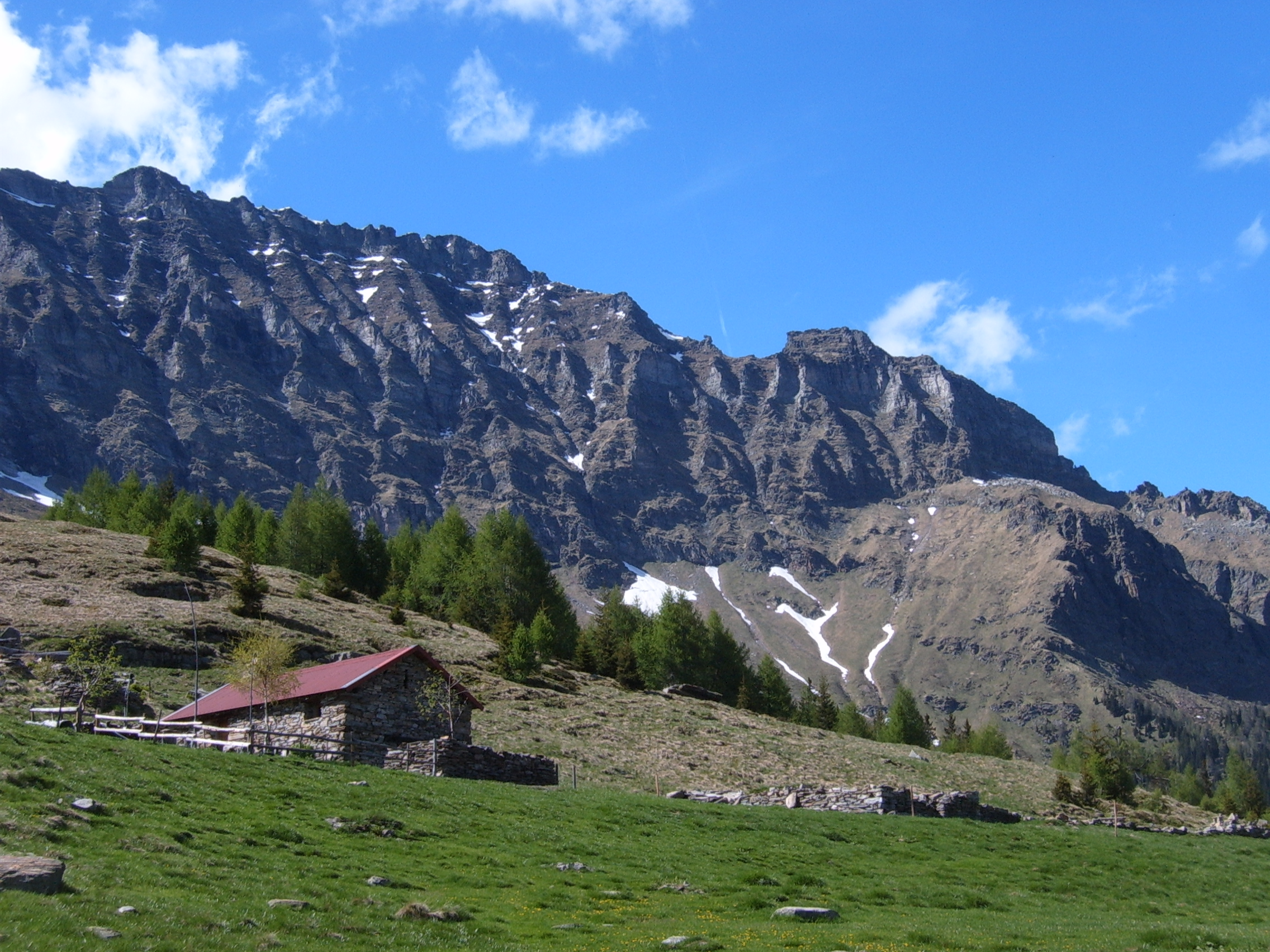 Alp de Cascinarsa (1747 m), Val Calanca, Grisons (Switzerland)